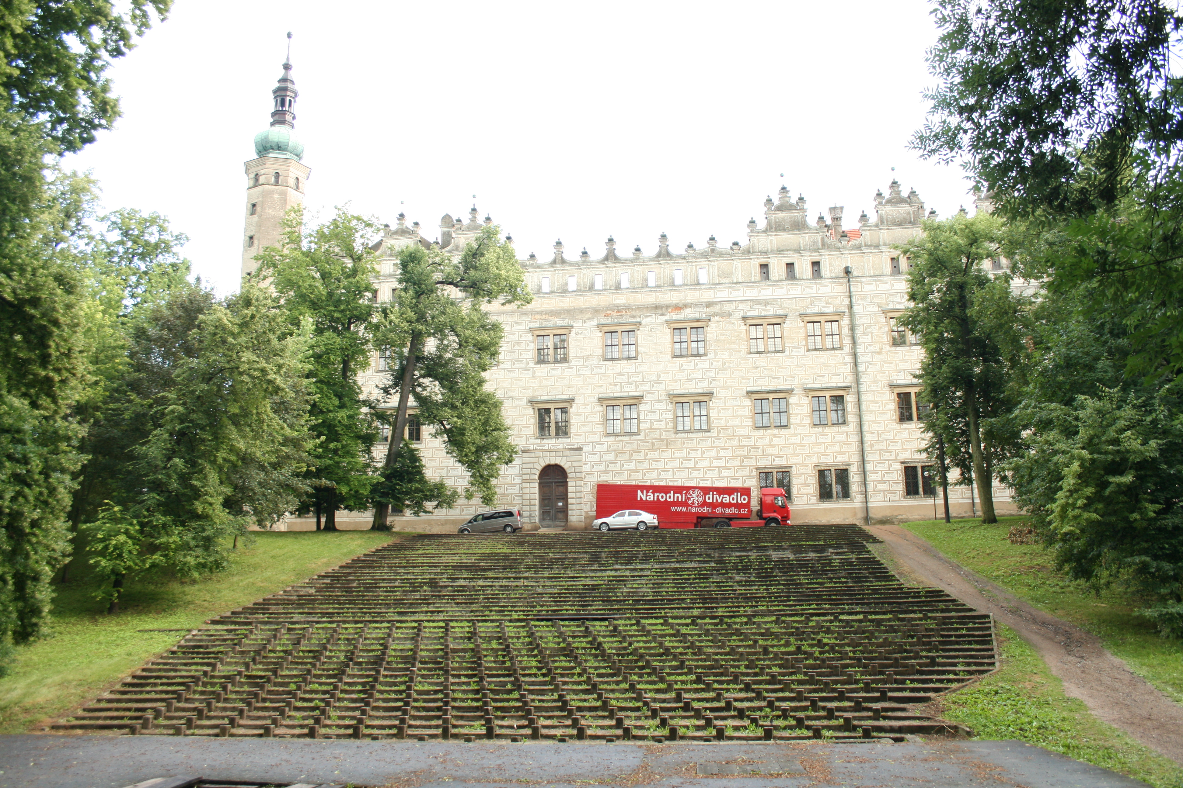 Pevné základy amfiteátru v zámeckém parku, dějiště mezinárodního operního festivalu Smetanova Litomyšl. V pozadí kamion Národního divadla Brno u zámecké budovy.